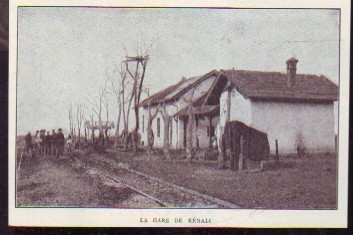 Гара Кенали през Първата световна война